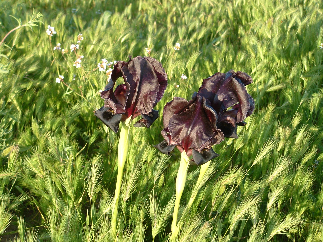 אירוס שחום ליד תל ערד